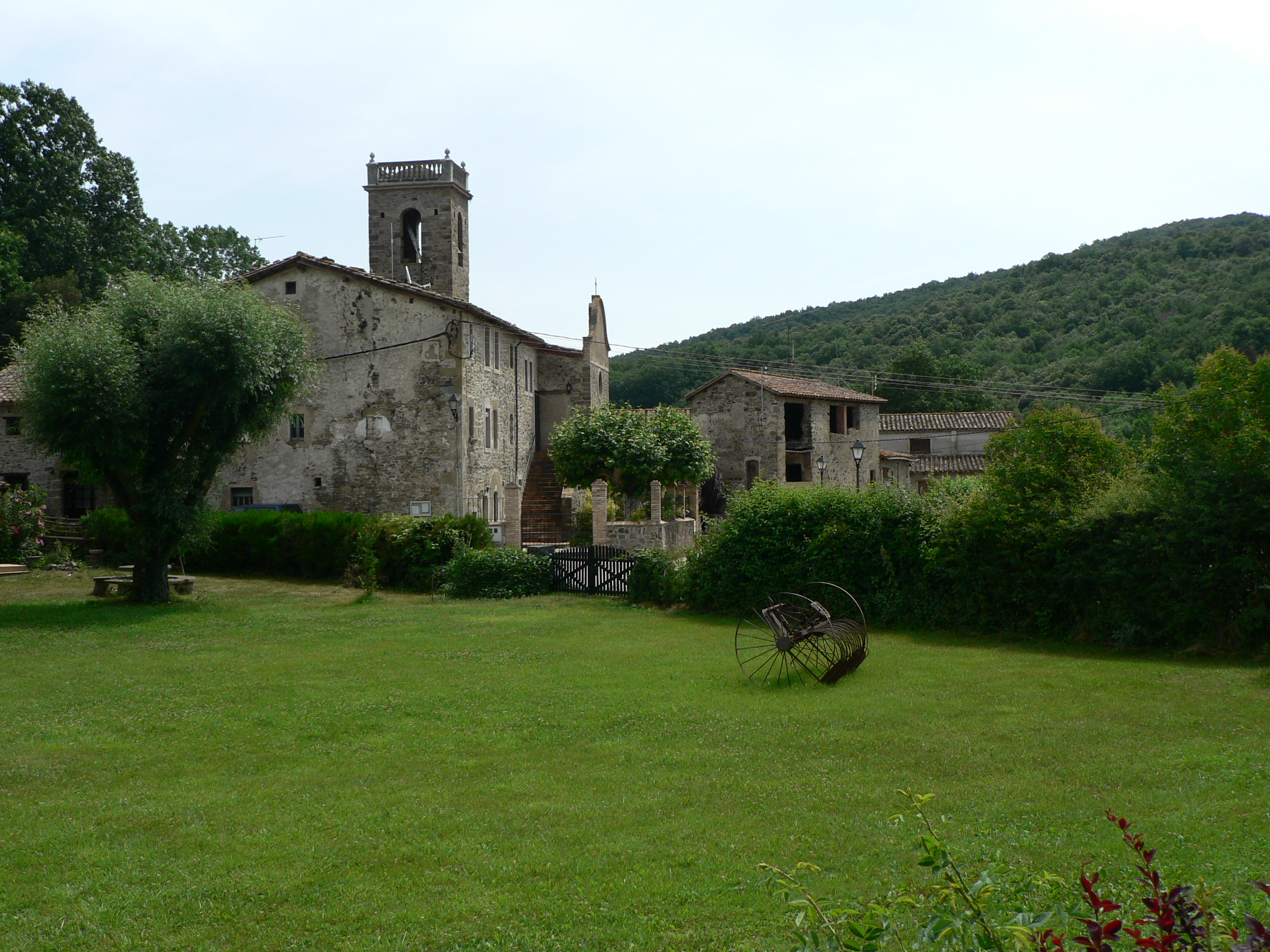 El Torn, amb el campanar de l'església de Sant Andreu